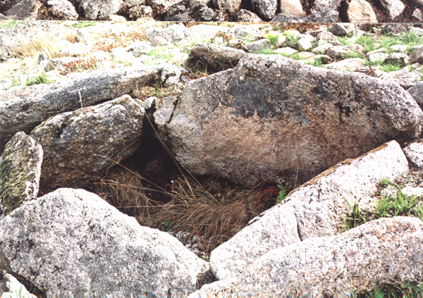 Dolmen 1 at Outeiro de Gregos, Baião, Portugal